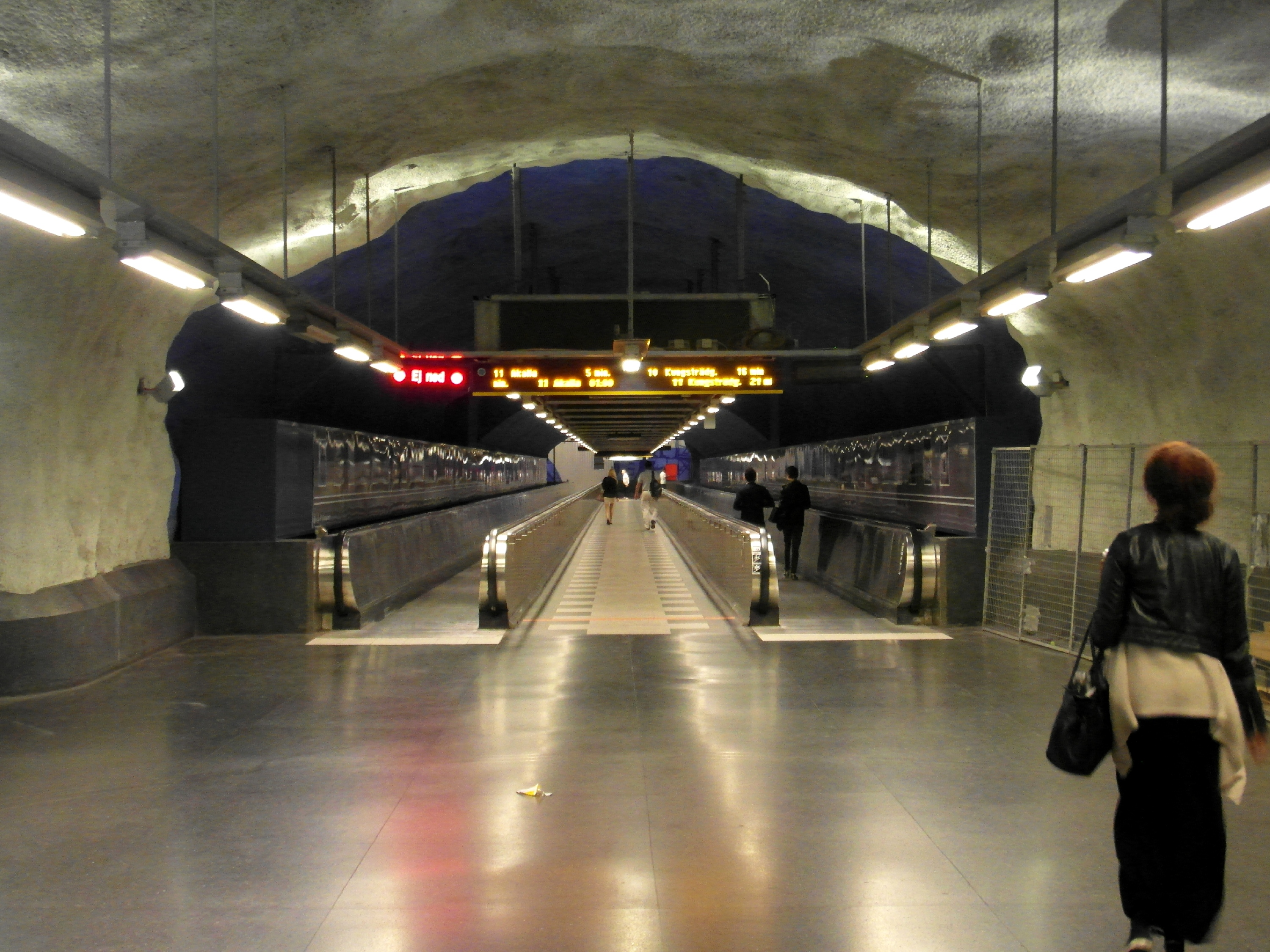 Gröna linjen - Blå linjen - Röda linjen T10 - T11 - T13 - T14 - T17 - T18 - T19